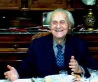 96. szulinapi bulirol.